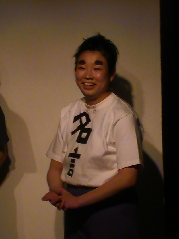 きょどり親方 (2017年4月)